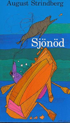 Bokomslag Strindberg